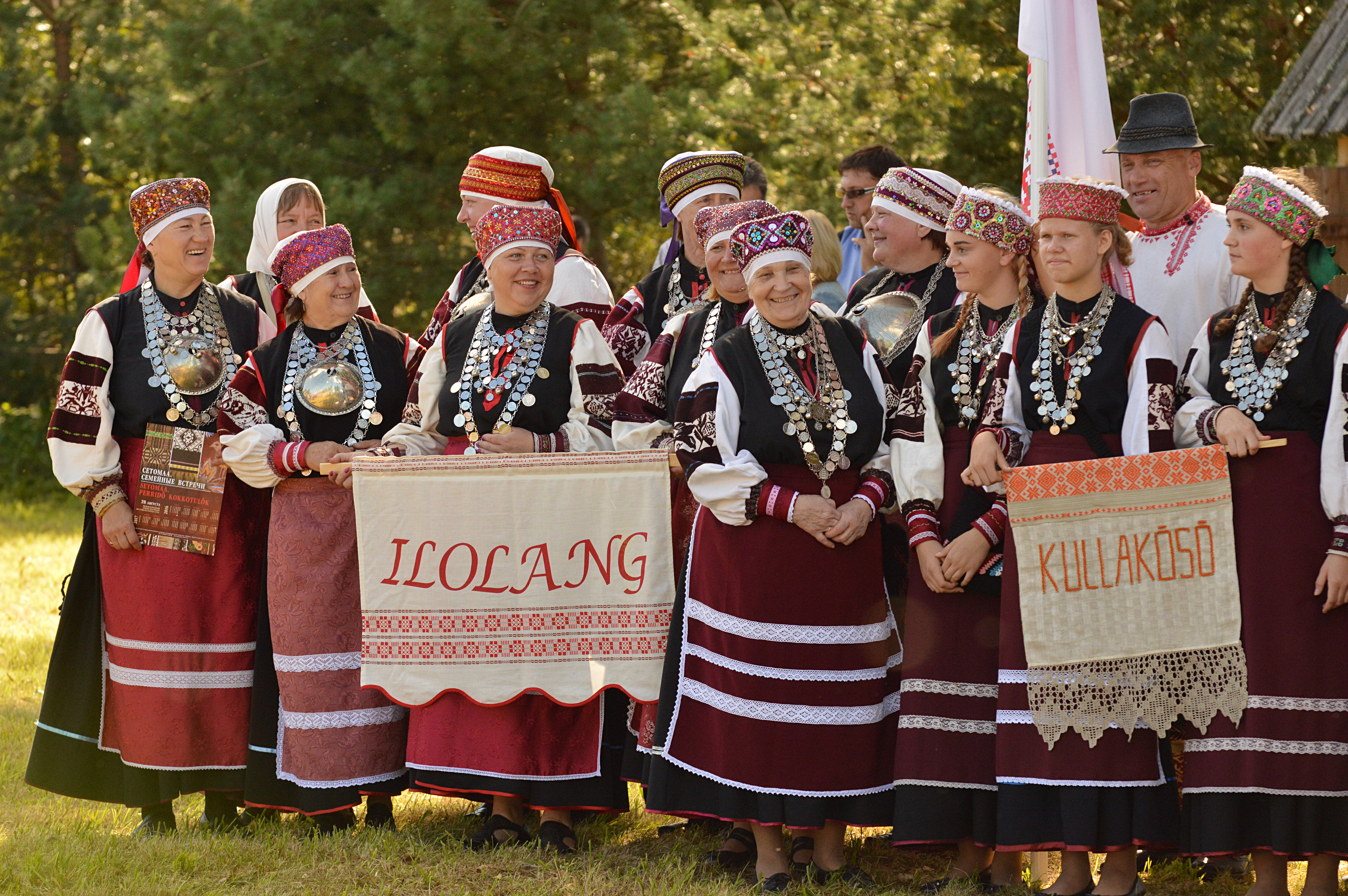 Seto kultuuri festival Radajal.